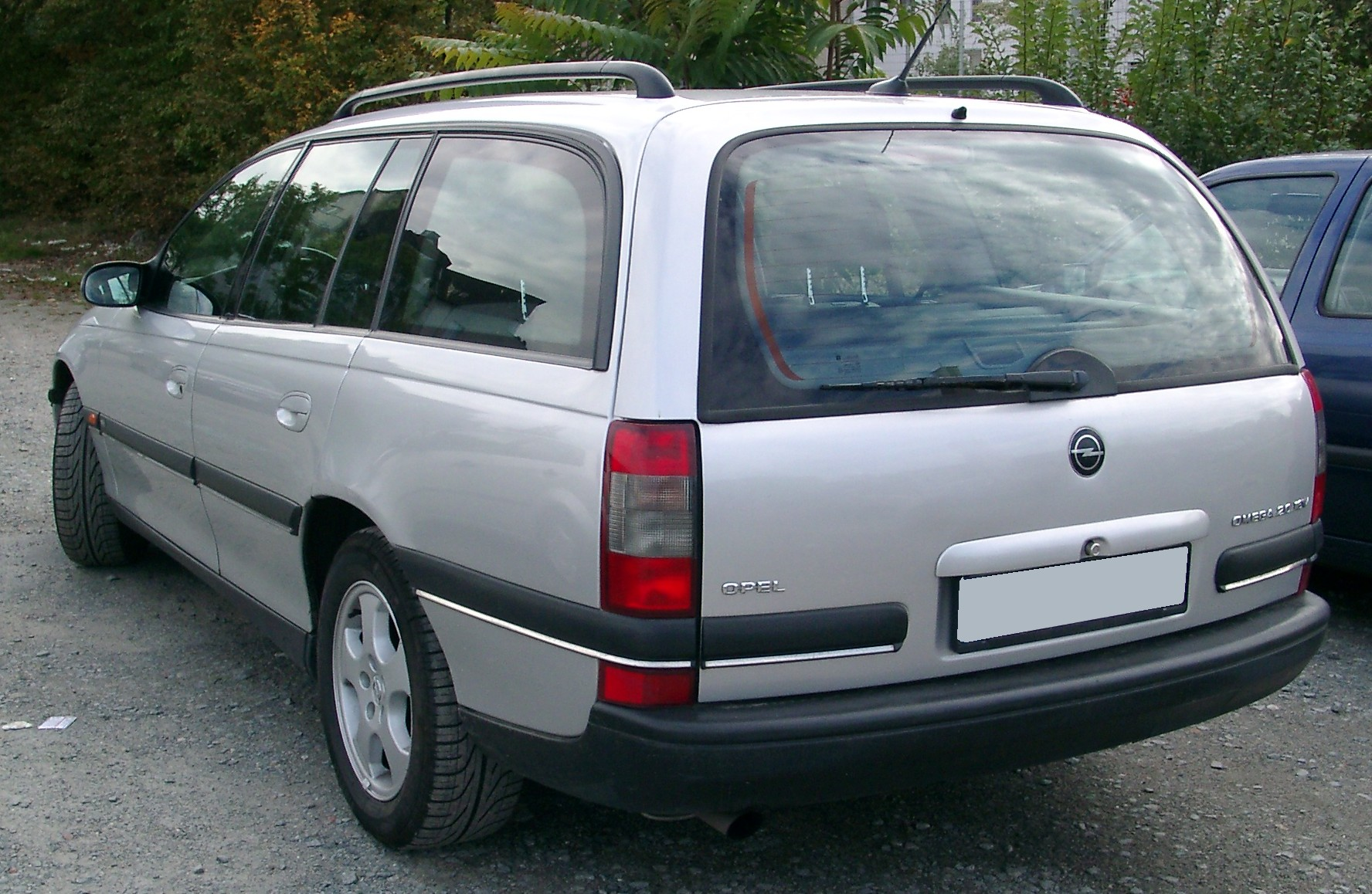 Opel Omega B Caravan